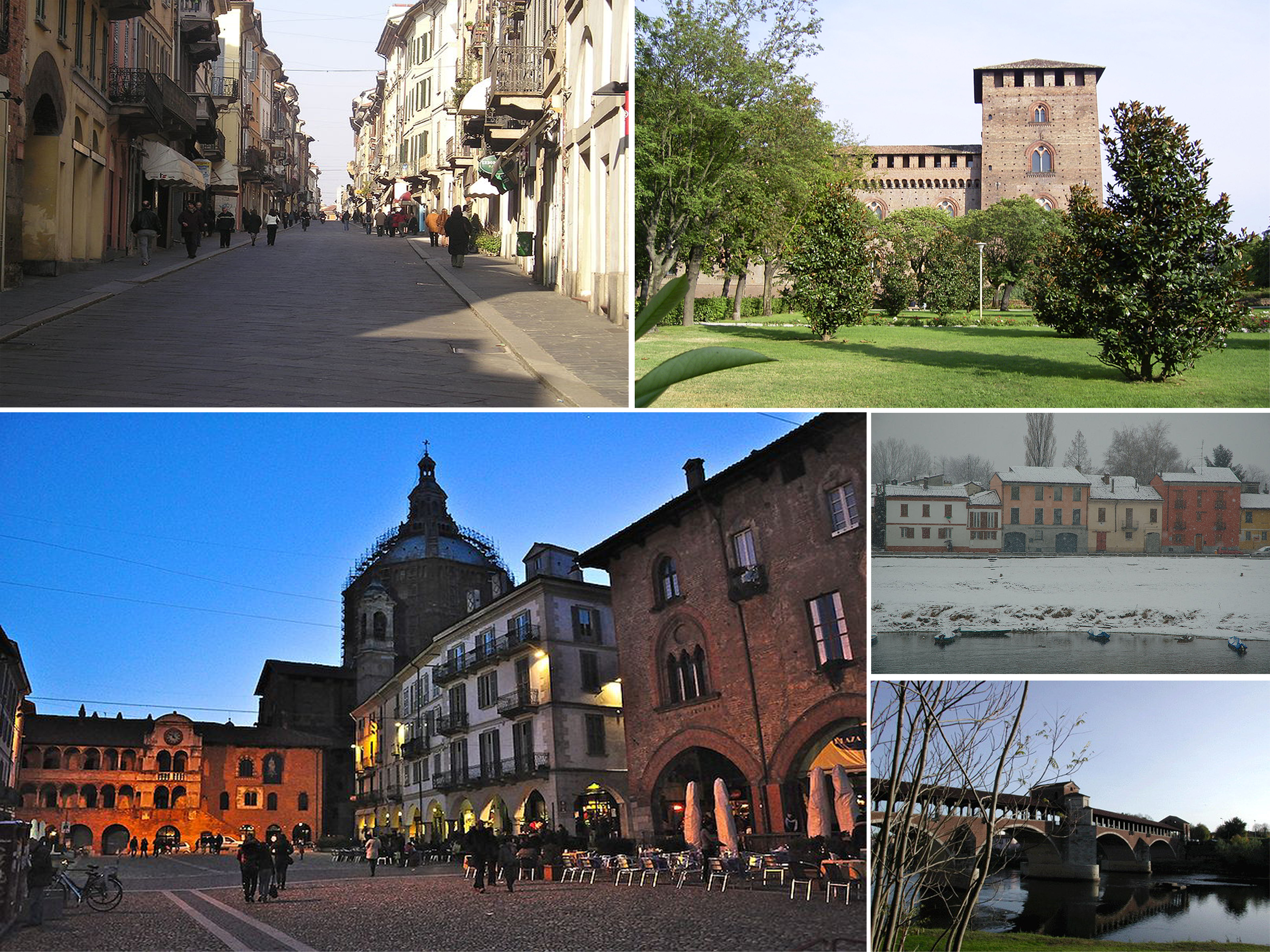 Collage di varie foto su Pavia